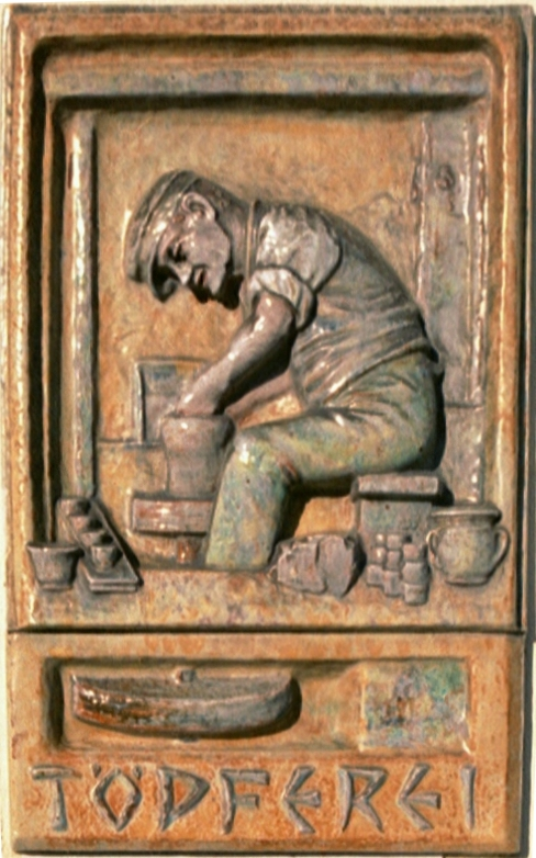 Relief von Kurt Feuerriegel am Bahnhof Frohburg